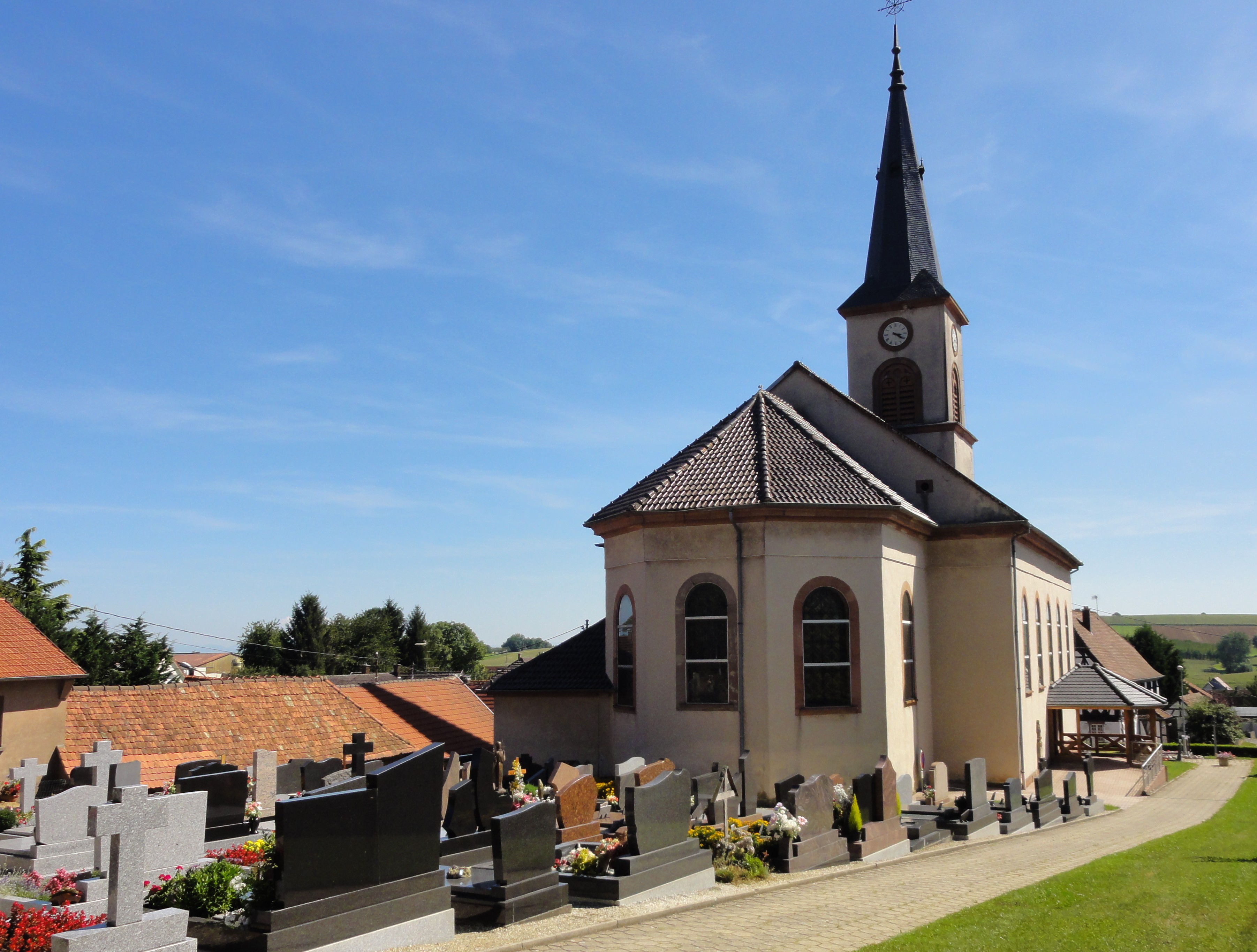 Alsace, Bas-Rhin, Morschwiller, Église Saint-Étienne (IA00061699).